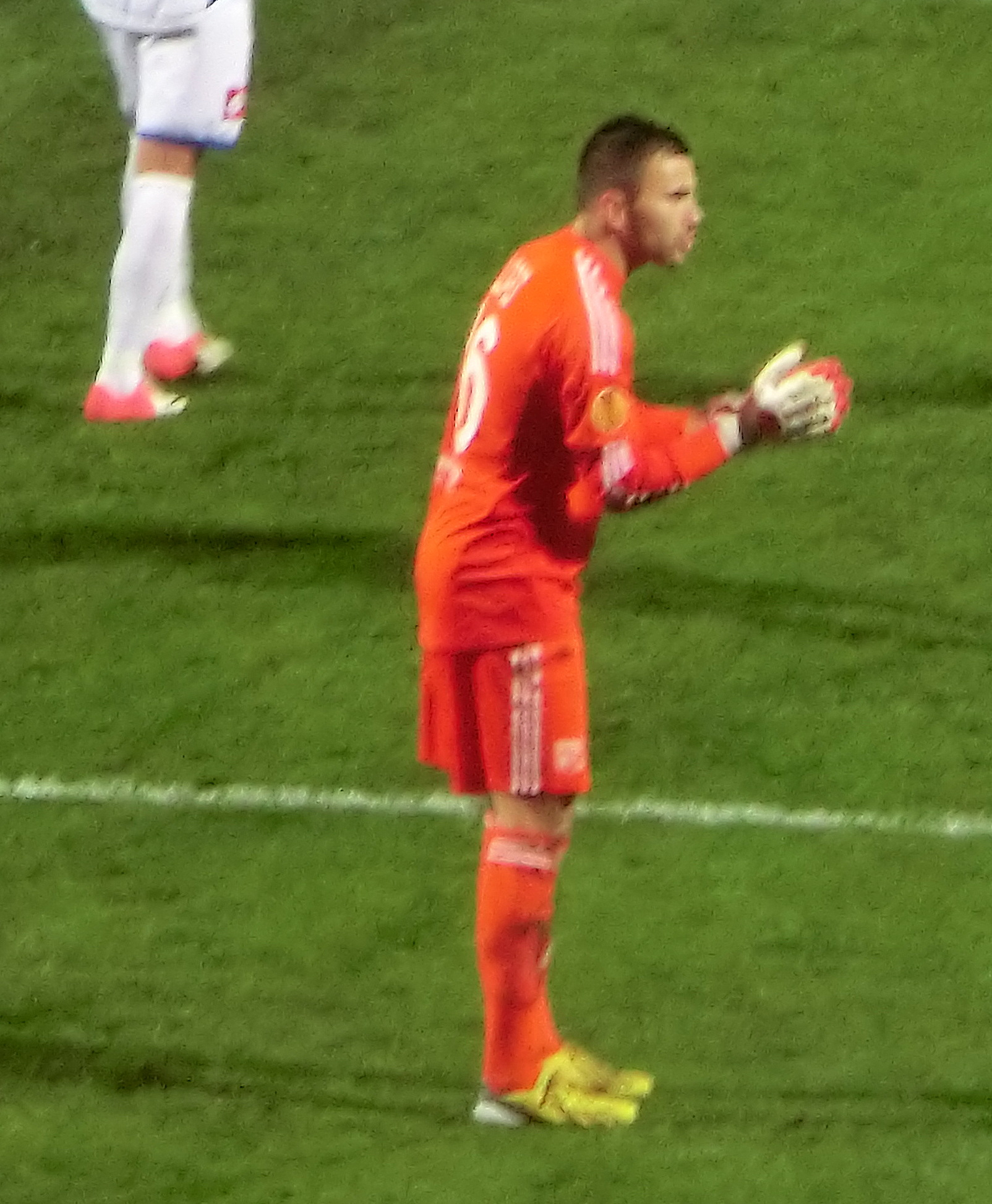 Anthony Lopes en Ligue Europa avec l'OL : match OL - Hapoël Ironi Kiryat Shmona (UEFA Europa League, 2012), à Gerland.